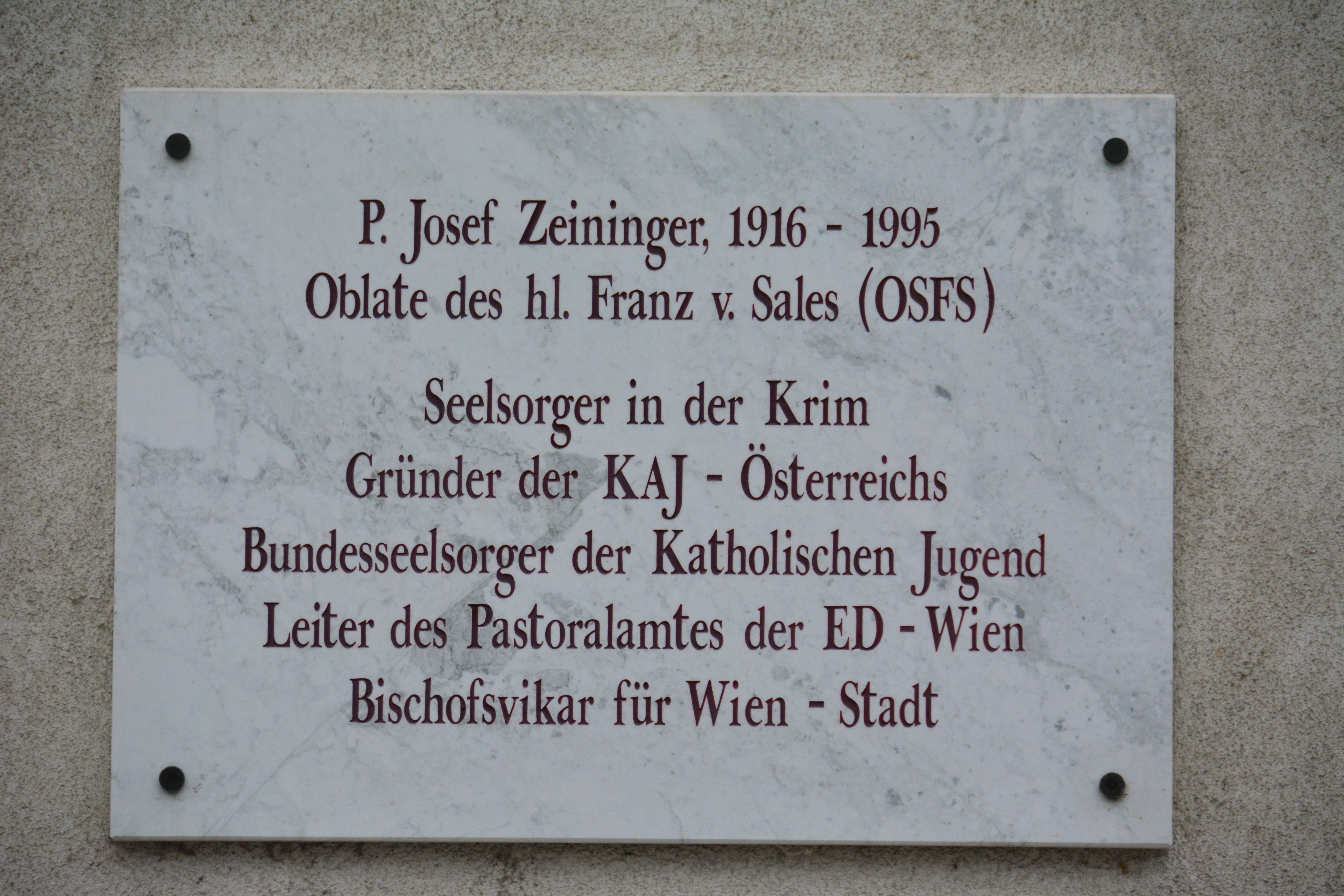 Gedenktafel für Pater Josef Zeininger (Wien, Pater-Zeininger-Platz 1)